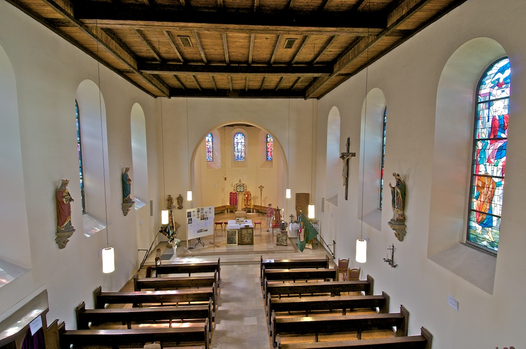 Kierch Oberbillig bannen